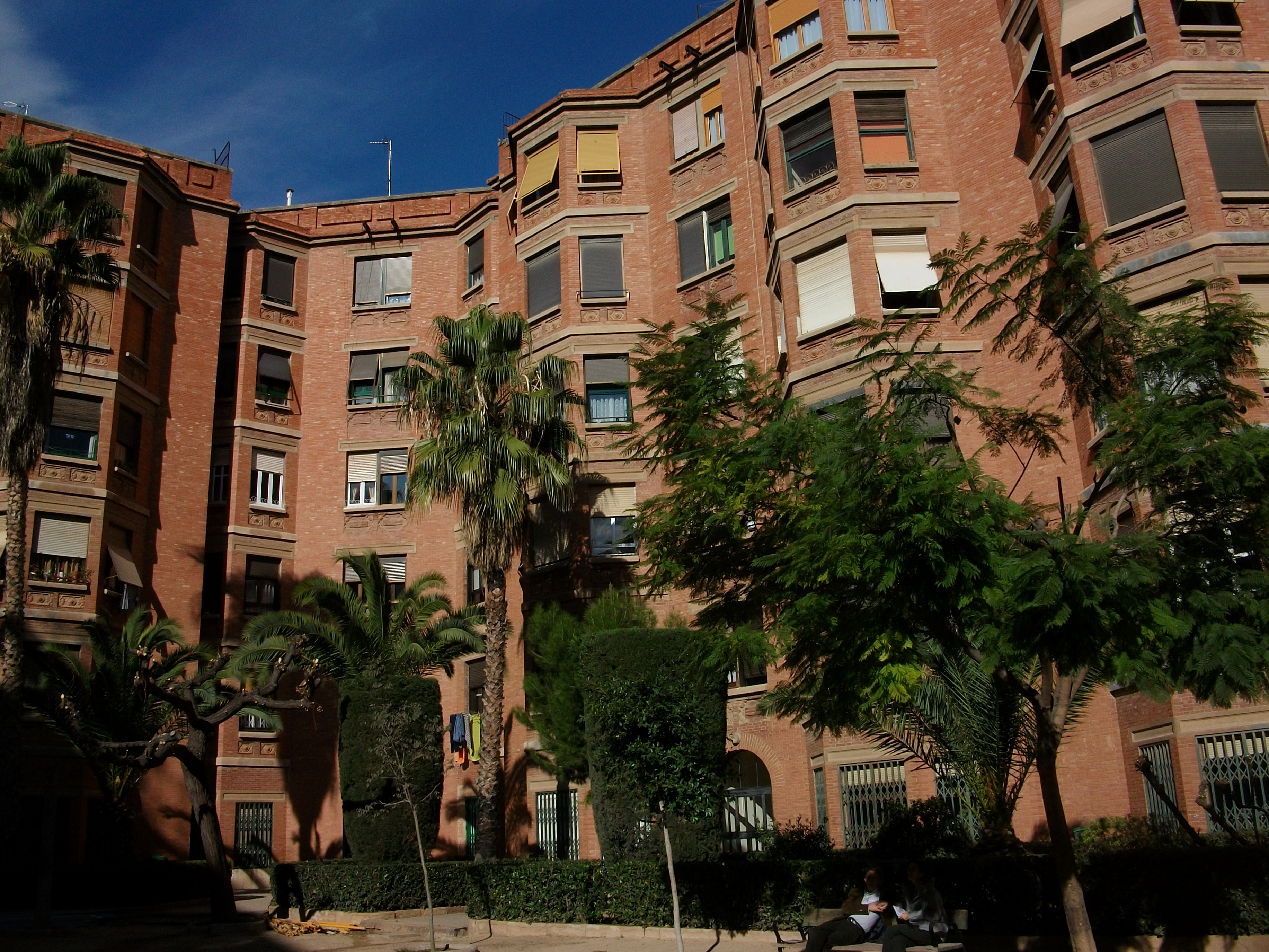 patii interior de la Finca Roja de València, País Valencià.